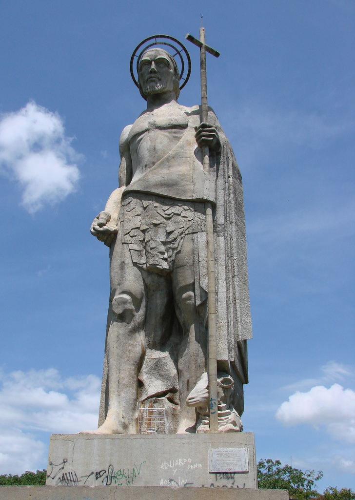 Monumento a San Juan Bautista, San Juan de los Morros, Venezuela.